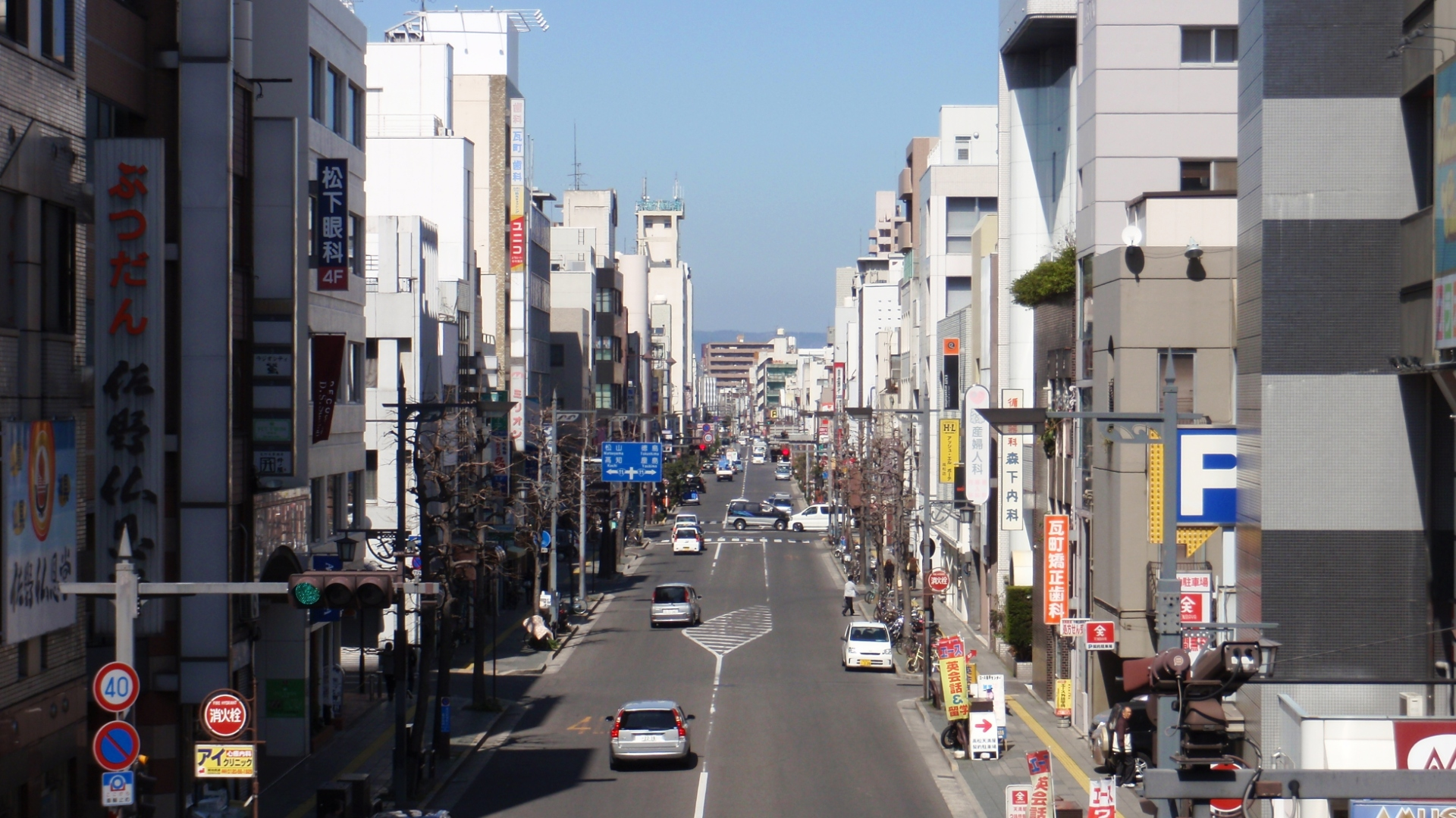 香川県高松市にあることでん瓦町駅前のペデストリアンデッキ上からみたフェリー通り。